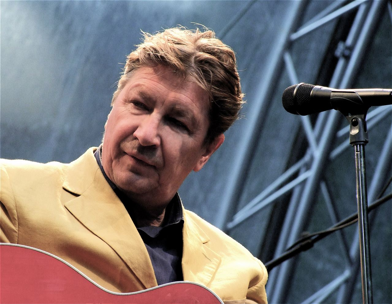 Henk Hofstede. Foto gemaakt op het Lange Voorhout in Den Haag . De Nits traden op ivm het Haags uitfestival